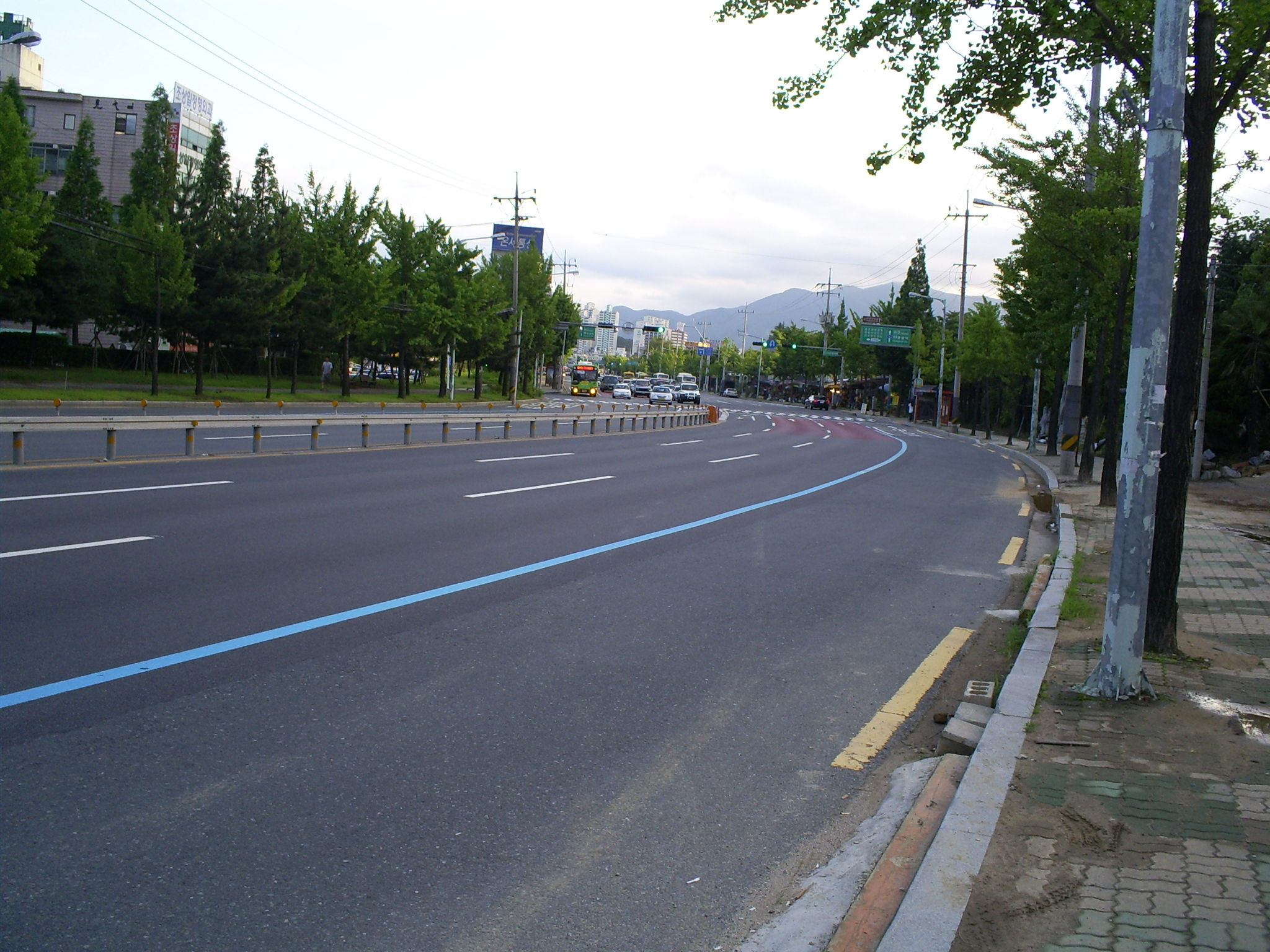 창원시 의안로 전경 촬영사진, 버스전용차로가 도로 양 끝 지점에 표시되어 있다. 촬영장소 : 창원역 인근